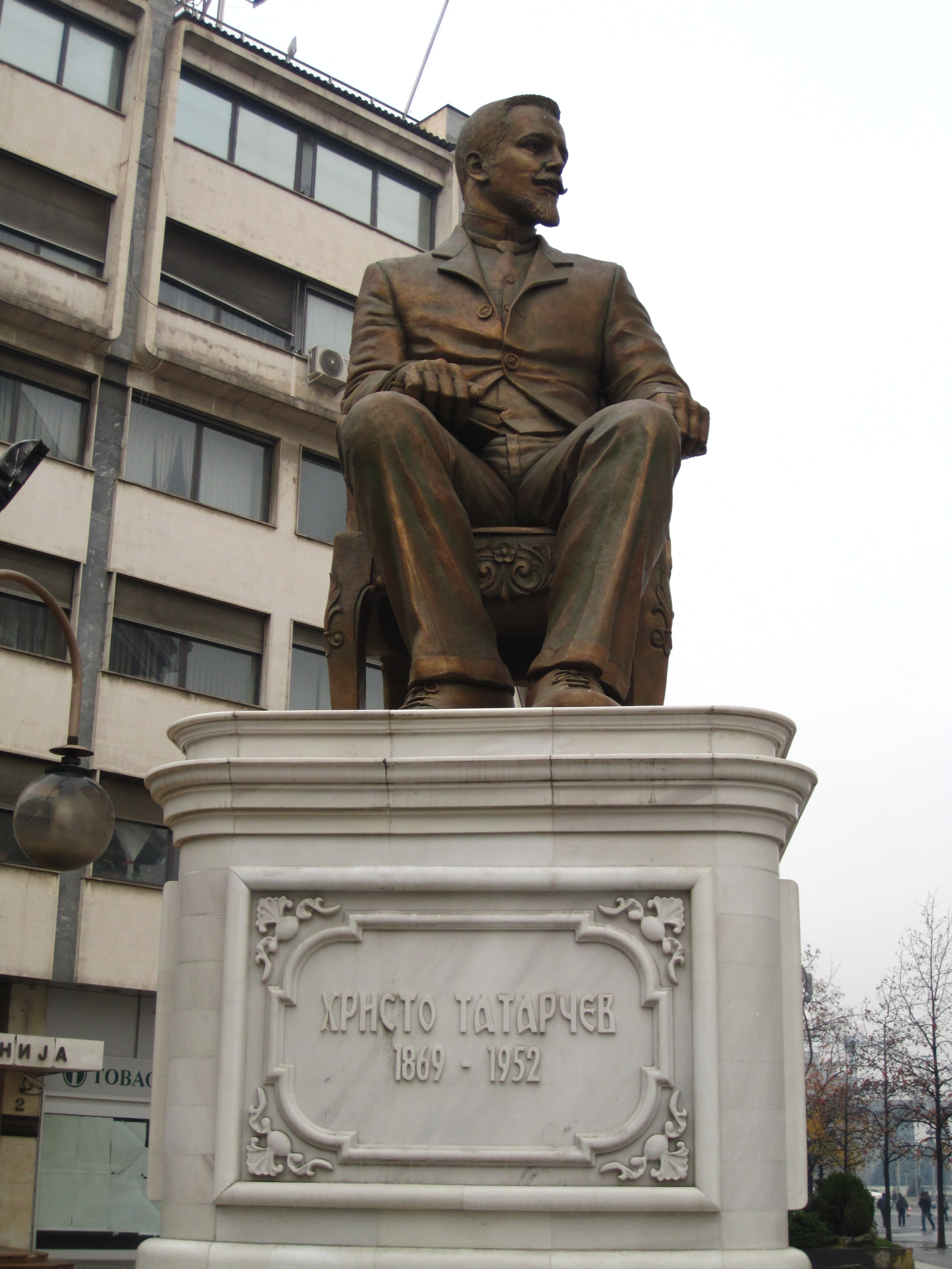 Споменик од Христо Татарчев во Скопје. Д-р Христо Татарчев (16 декември 1869, Ресен – 2 јануари 1952, Торино, Италија) бил лекар, еден од основачите на Македонската револуционерна организација и прв претседател на Централниот комитет.